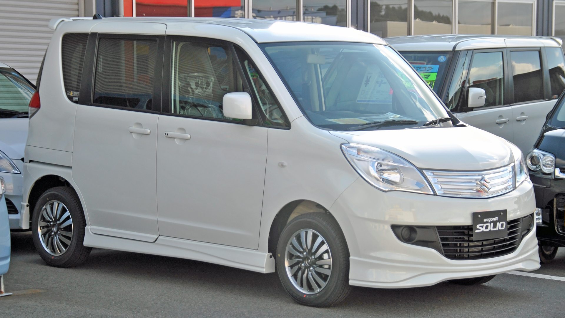 スズキ・ソリオ（3代目）